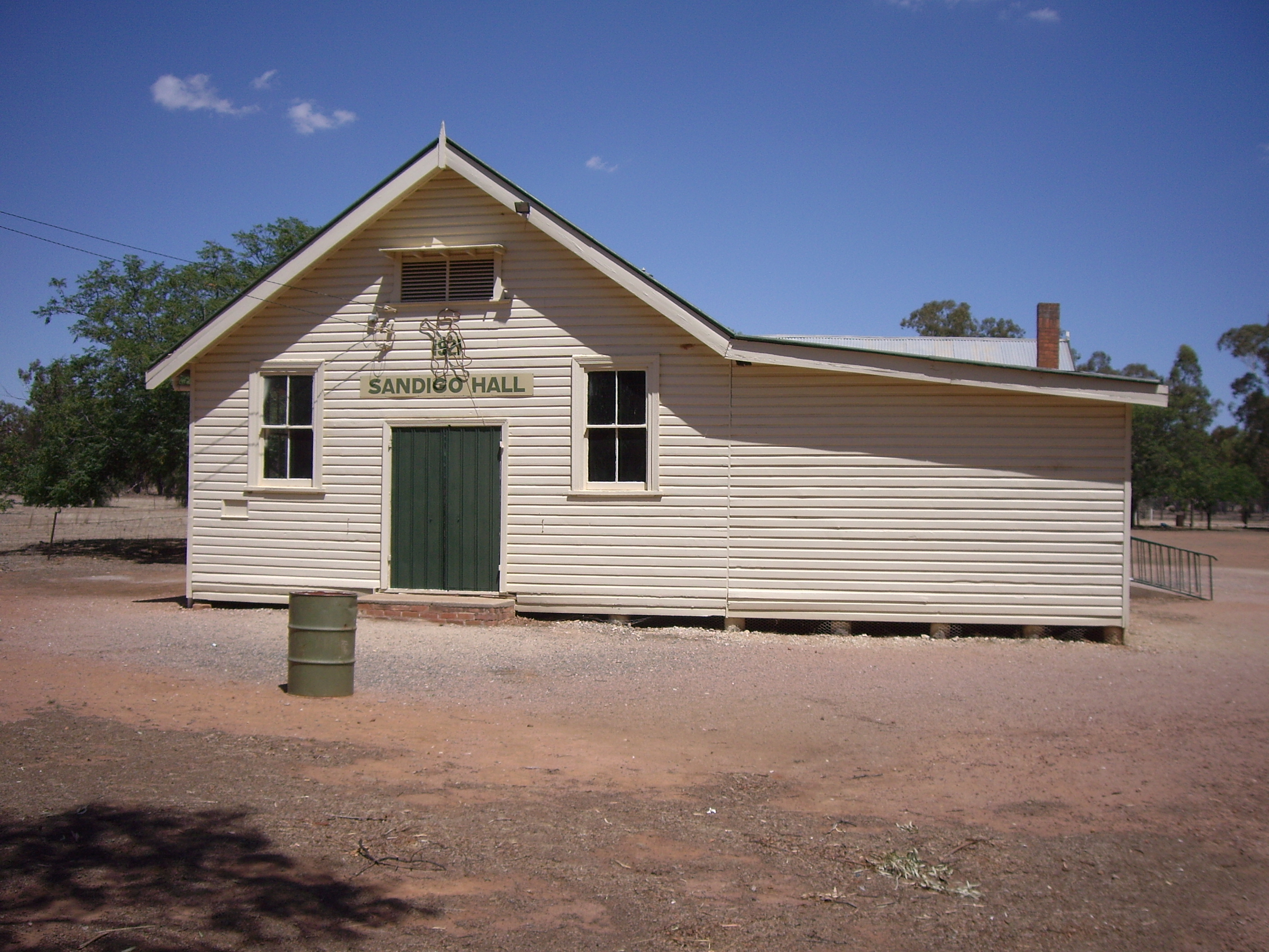 Sandigo Hall